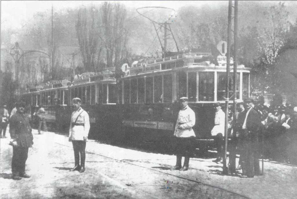 Открытие трамвая в Воронеже